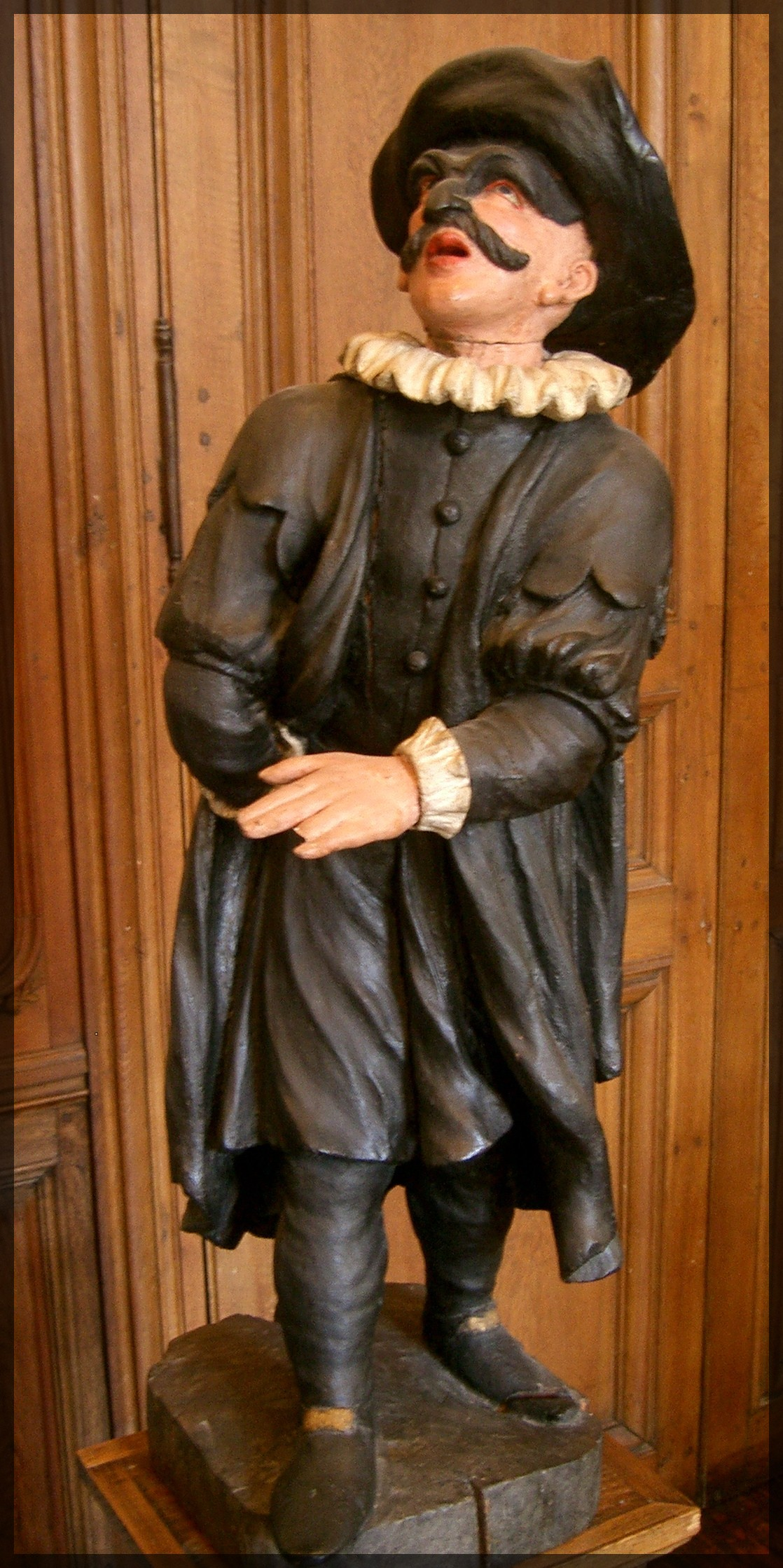 Personnage de la commedia dell'arte. Petite statue en plâtre peint (environ 100 cm) provenant du Théâtre Séraphin installé au Palais-Royal à la fin du XVIIIe siècle et conservée au musée Carnavalet à Paris (série de quatre pièces : Arlequin – Pantalone – Il Dottore – Brighella).